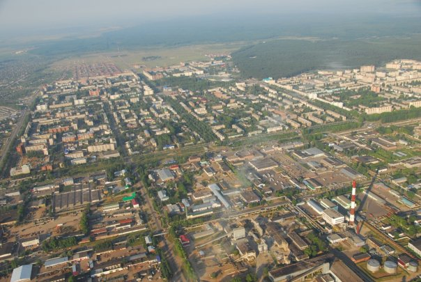 Вид сверху с вертолета